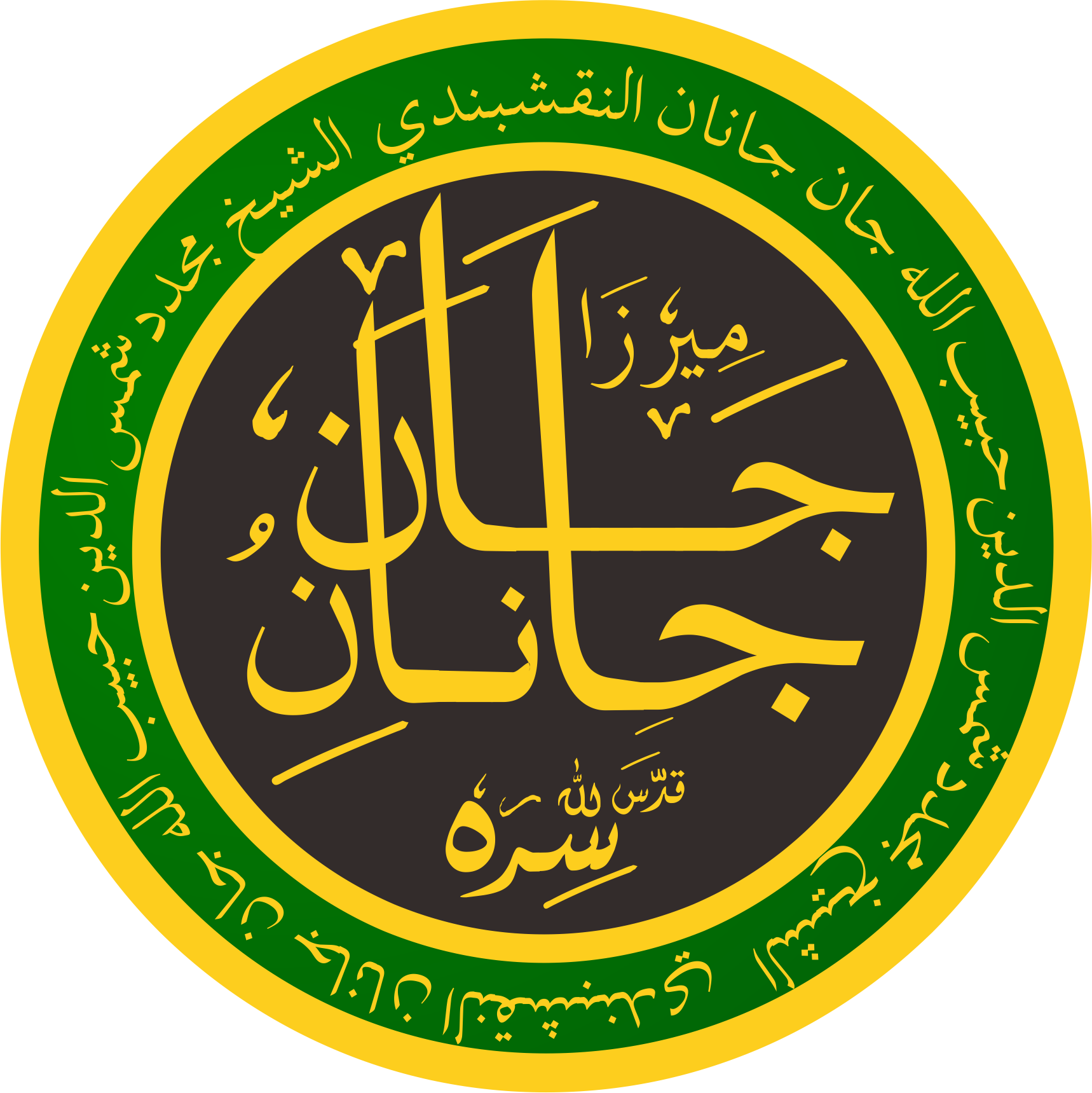 Mirza Jan janan